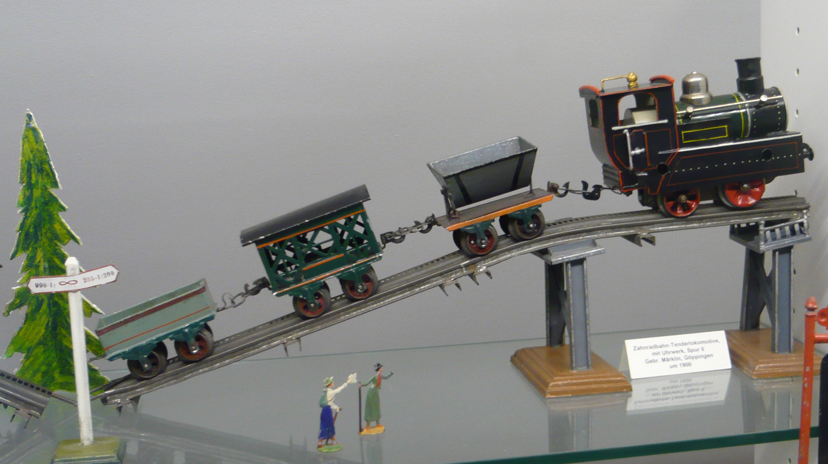 Zahnradbahn-Tenderlokomotive mit Uhrwerk in Spur 0 von Märklin (ca. 1900) aufgenommen im Zürcher Spielzeugmuseum Native nameZürcher SpielzeugmuseumLocationZürich, SwitzerlandCoordinates47° 22′ 23″ N, 8° 32′ 23″ E Established1956WebsiteZürcher SpielzeugmuseumAuthority control : Q248517